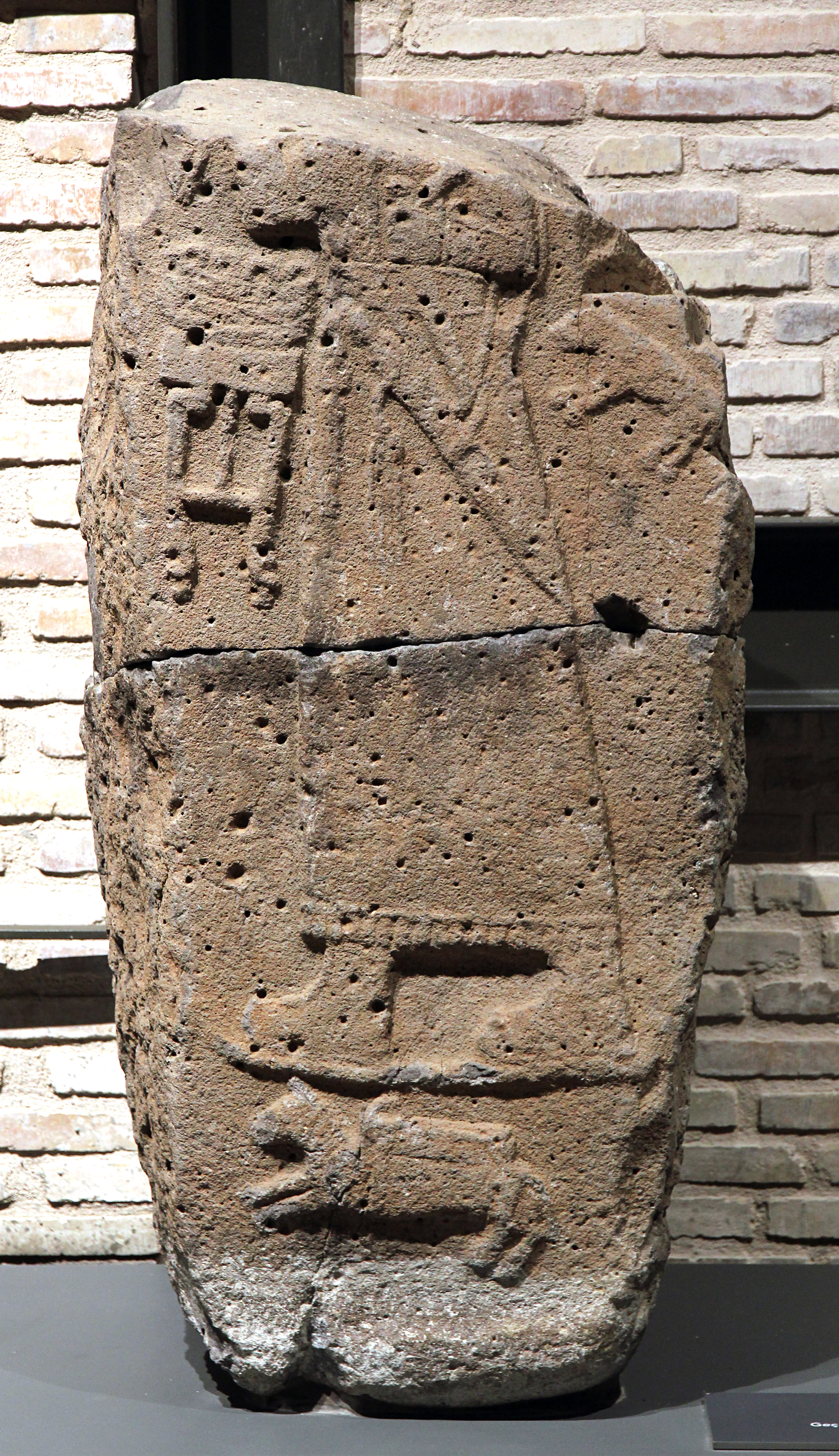 Archäologisches Museum Adana, Südtürkei, späthethitische Stele Söğütlü 1